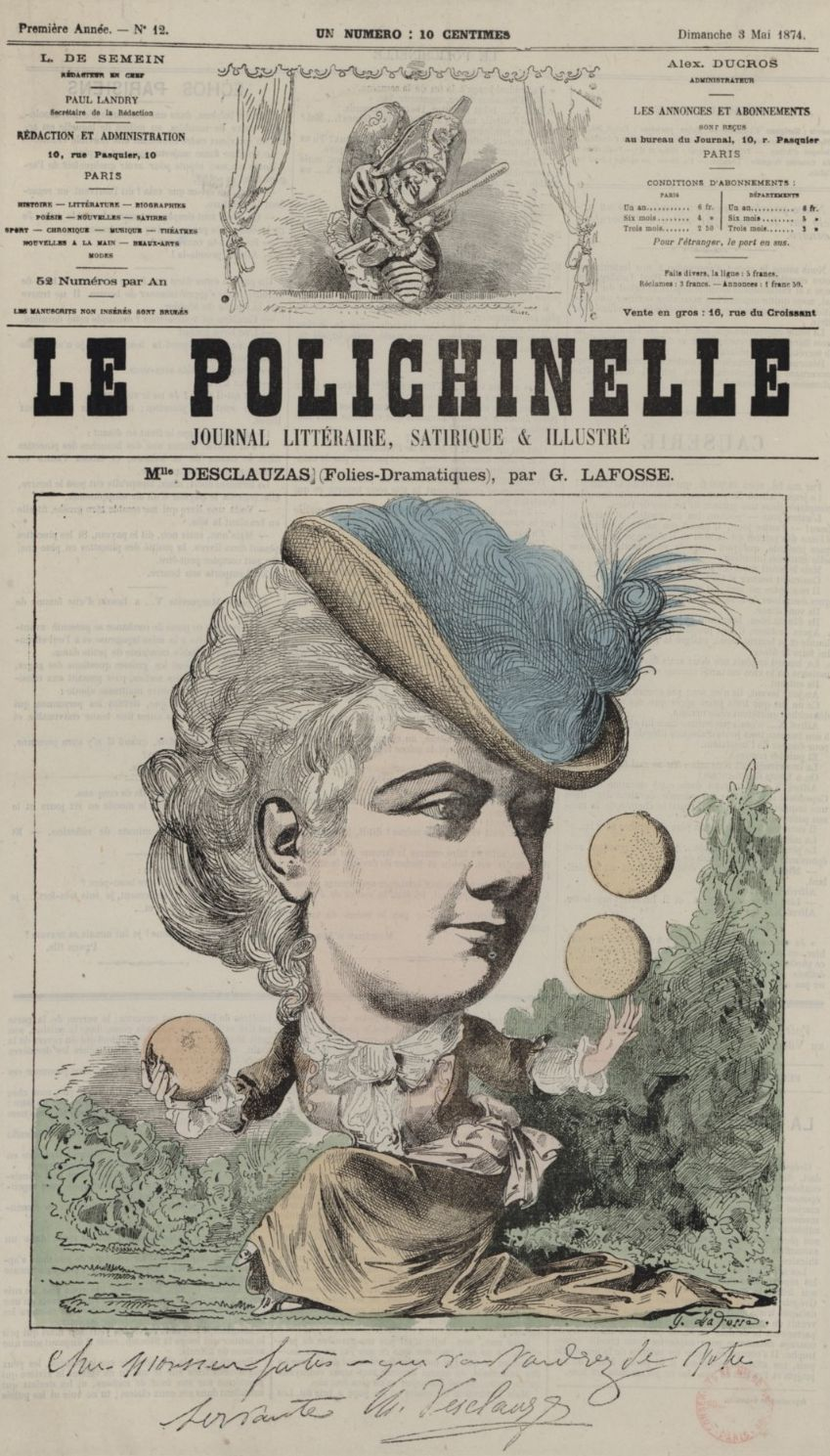 Marie Desclauzas, caricature de Georges Lafosse à la une du journal Le Polichinelle